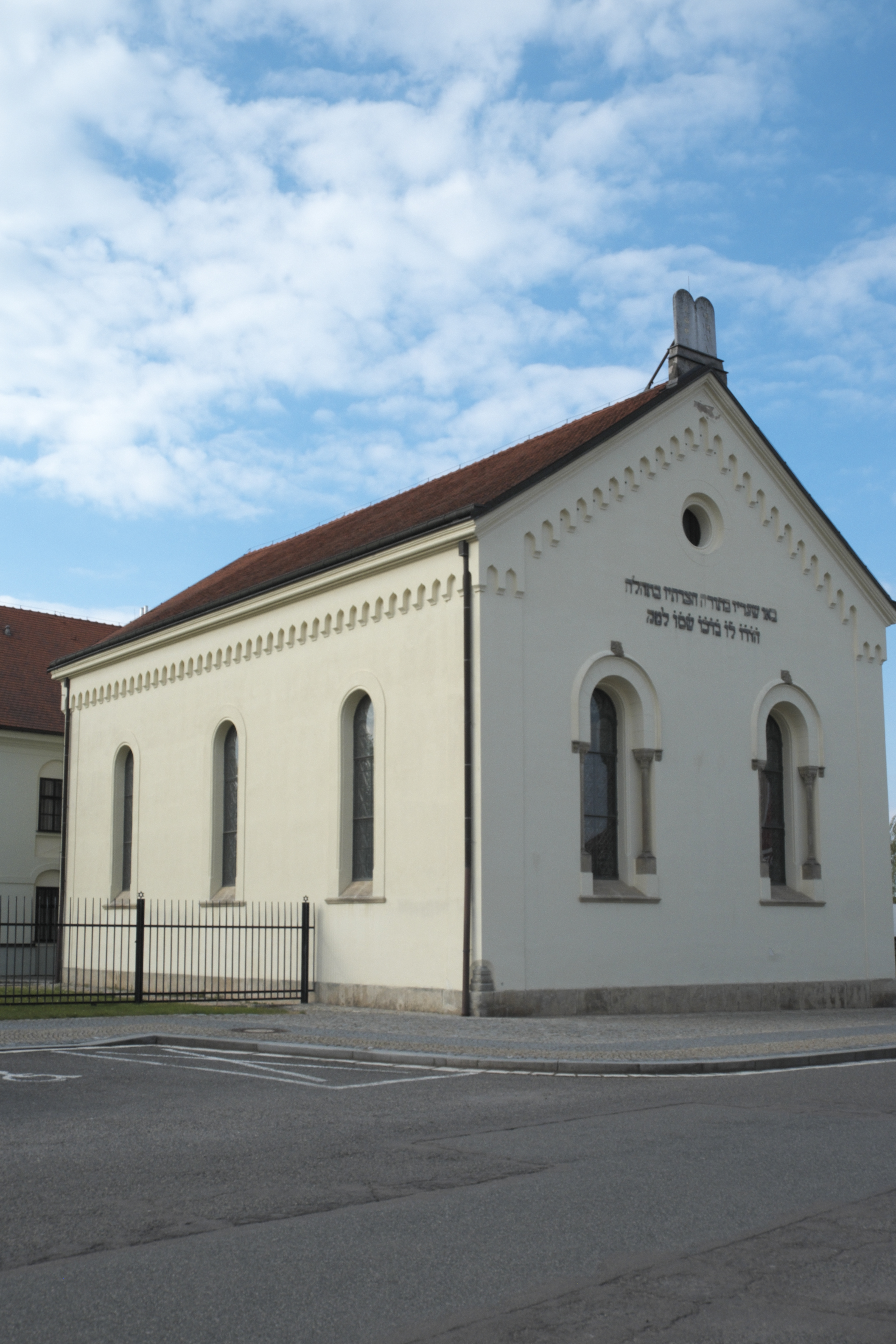 Synagoge in Heřmanův Městec im Okres Chrudim in der Pardubitzer Region (Pardubický kraj, Tschechien)